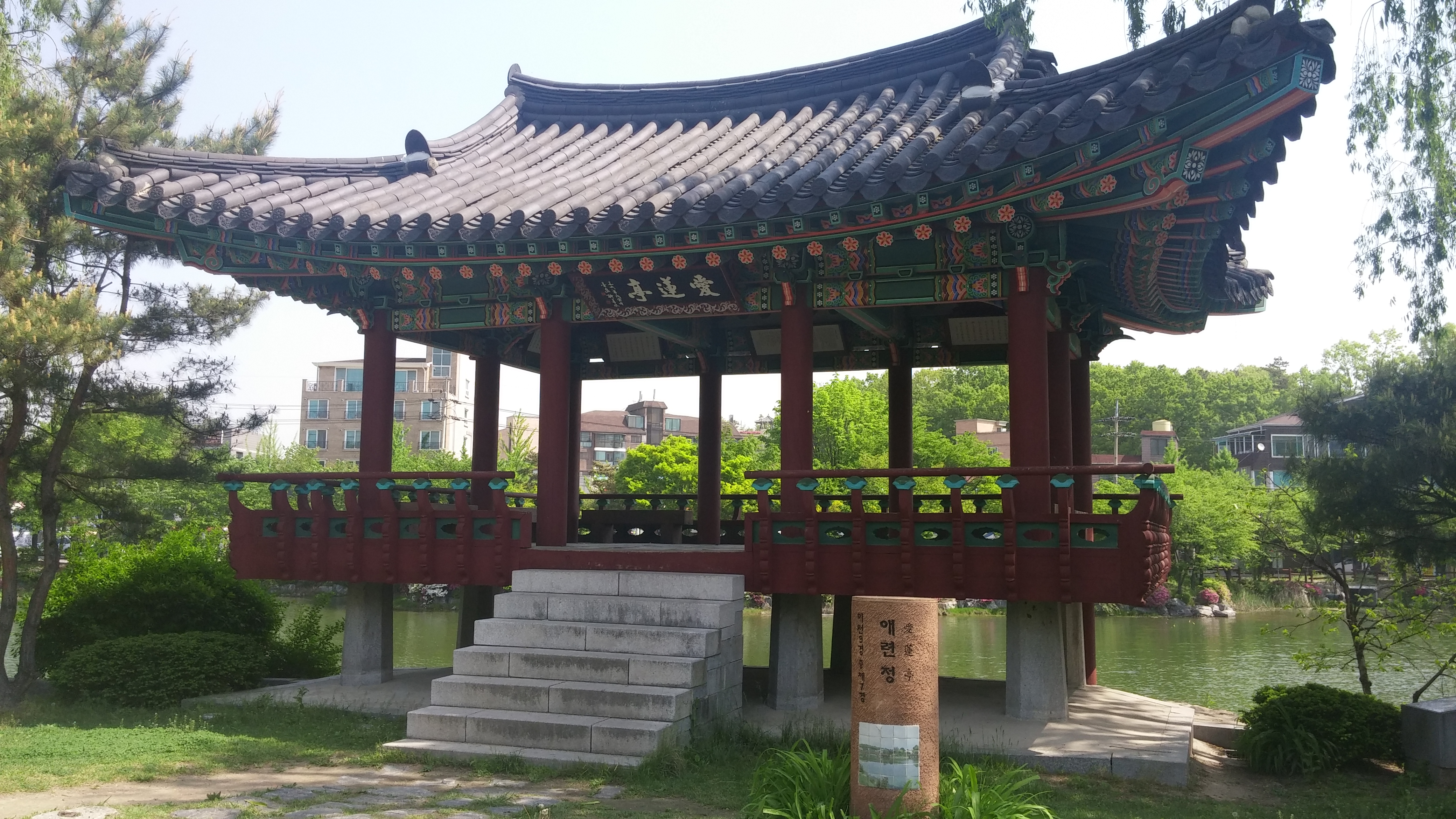 애련정 (1)